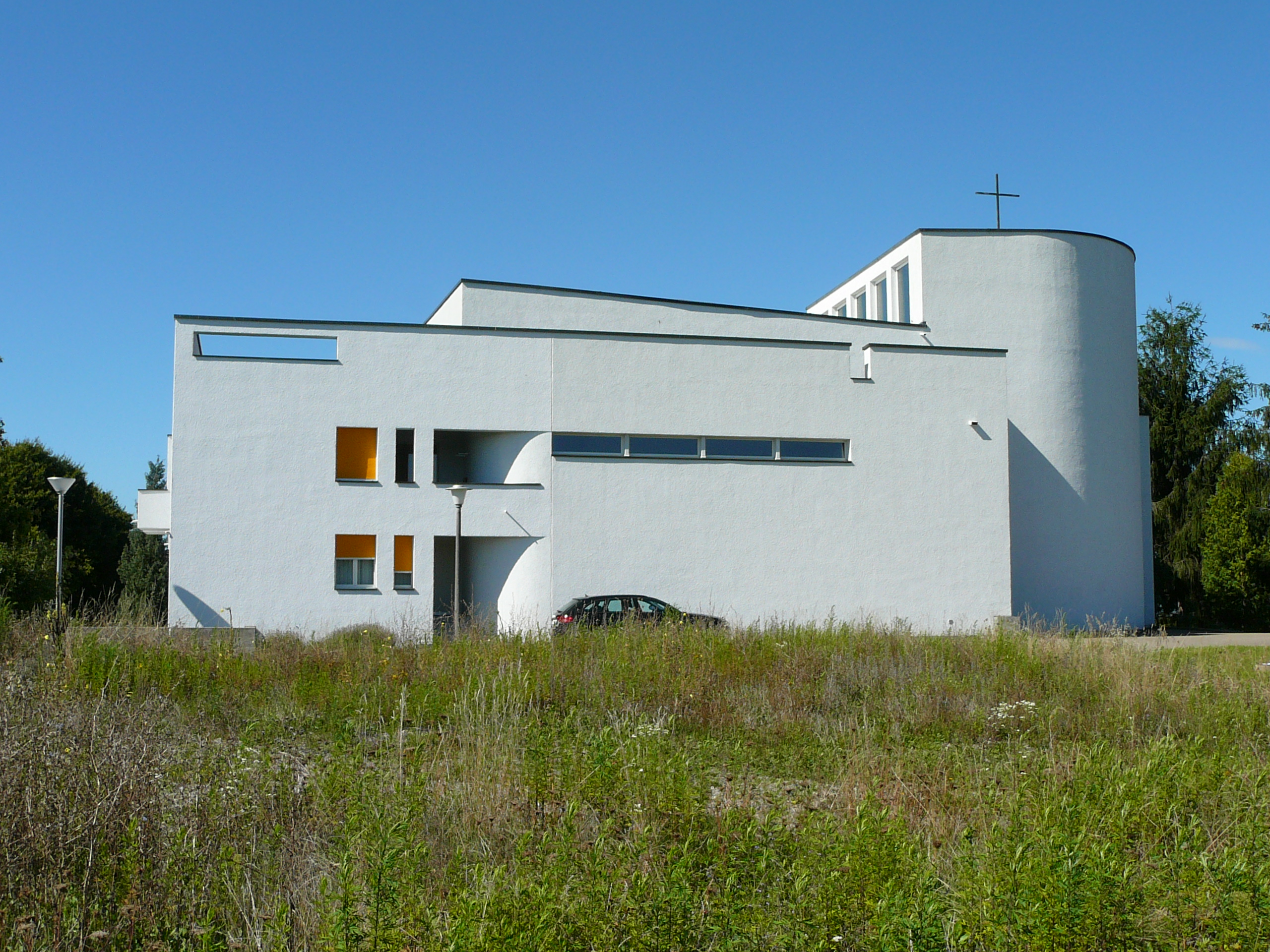 Römisch-katholische Pfarrkirche St. Petrus Rümlang, Ansicht von Südosten